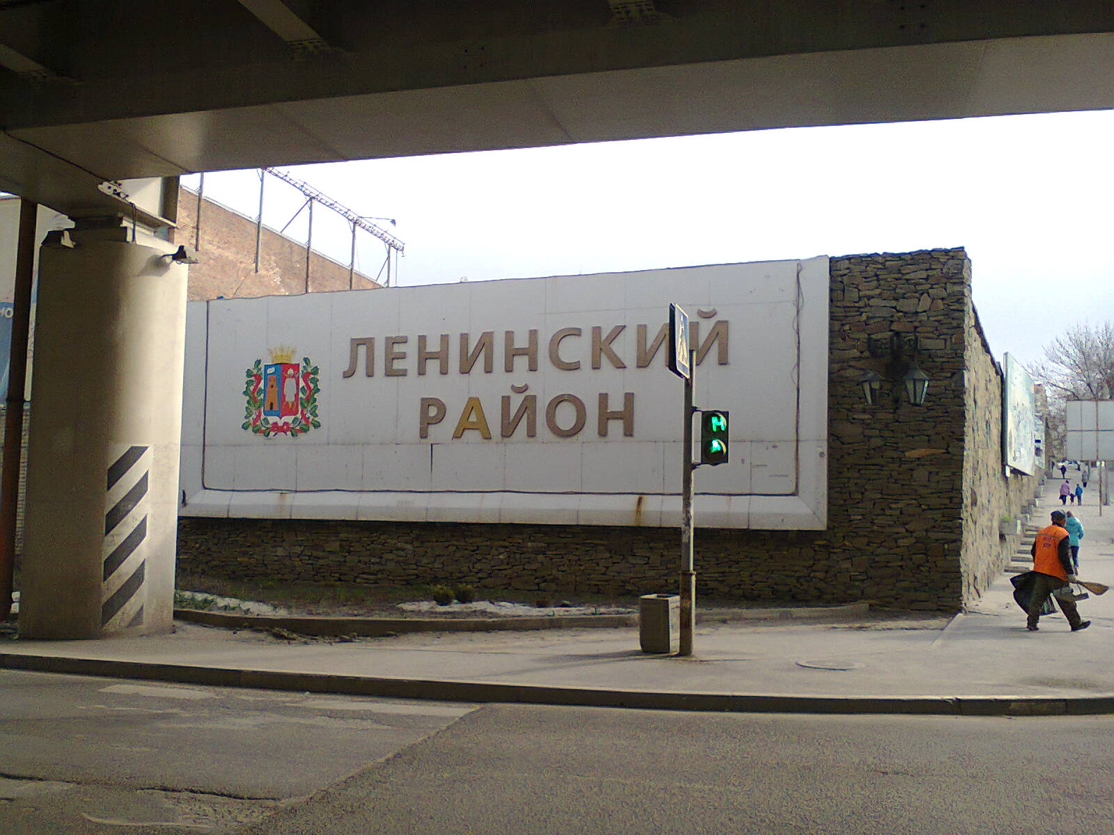 Ростов-на-Дону, граница Ленинского района, вид из-под виадука.